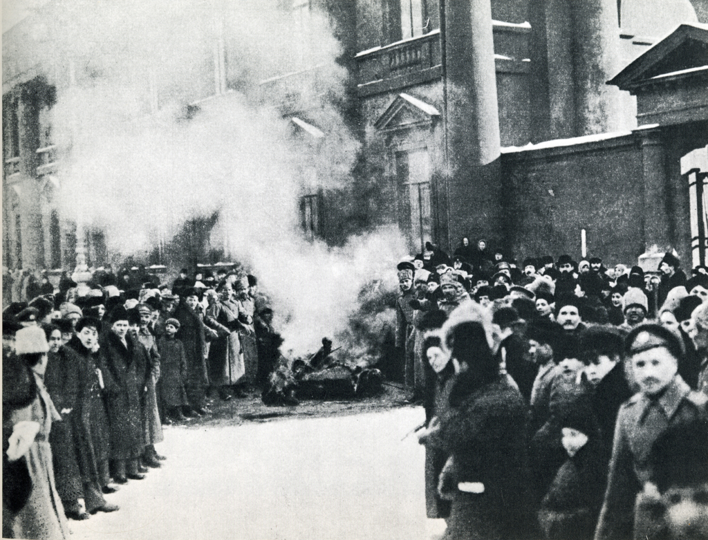 Quema de símbolos zaristas, 1917.